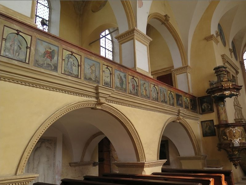 Kostel svatého Václava, západní okraj vsi, Sýčina.